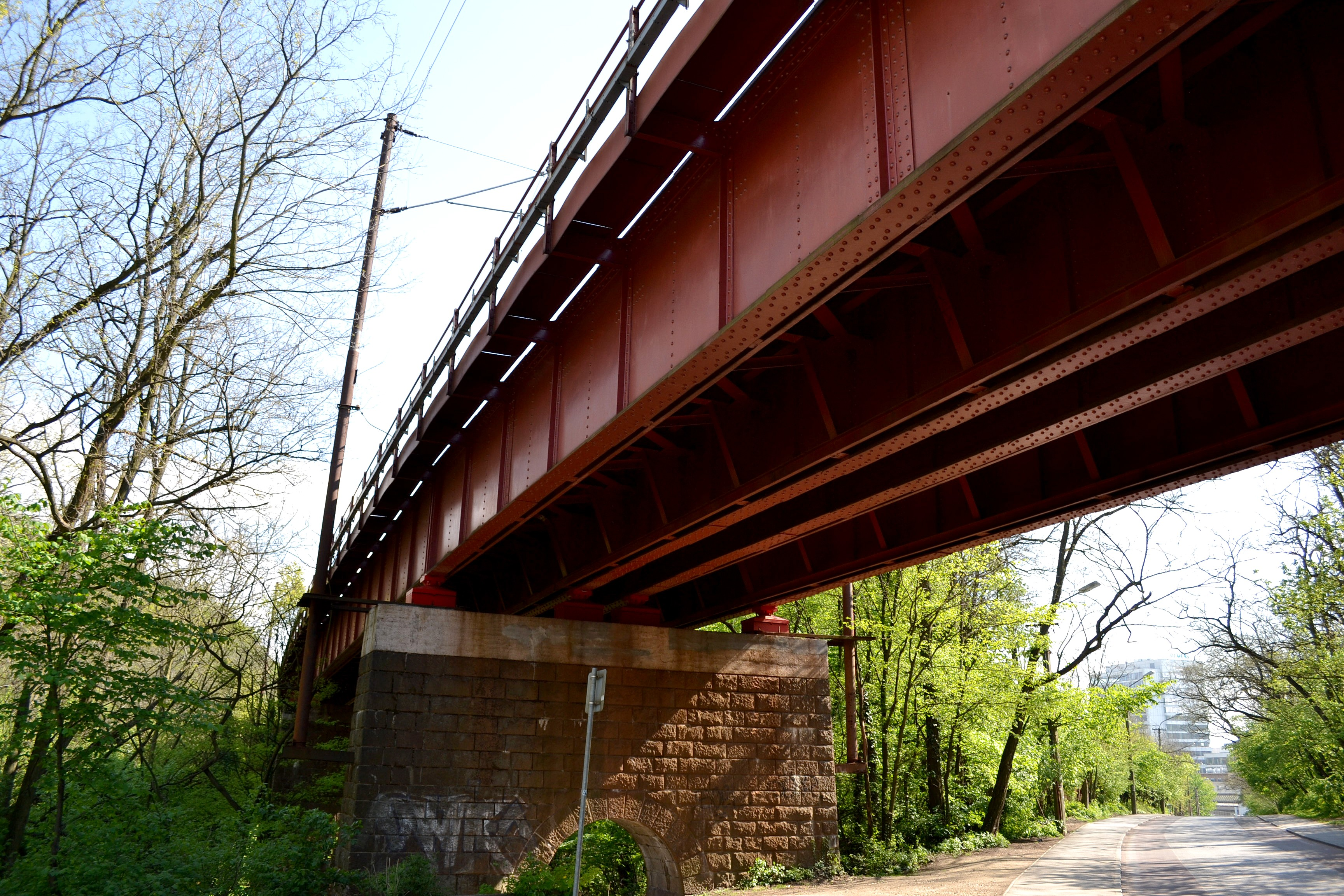 Červený most - súčasť železničnej trate č. 110. Detail